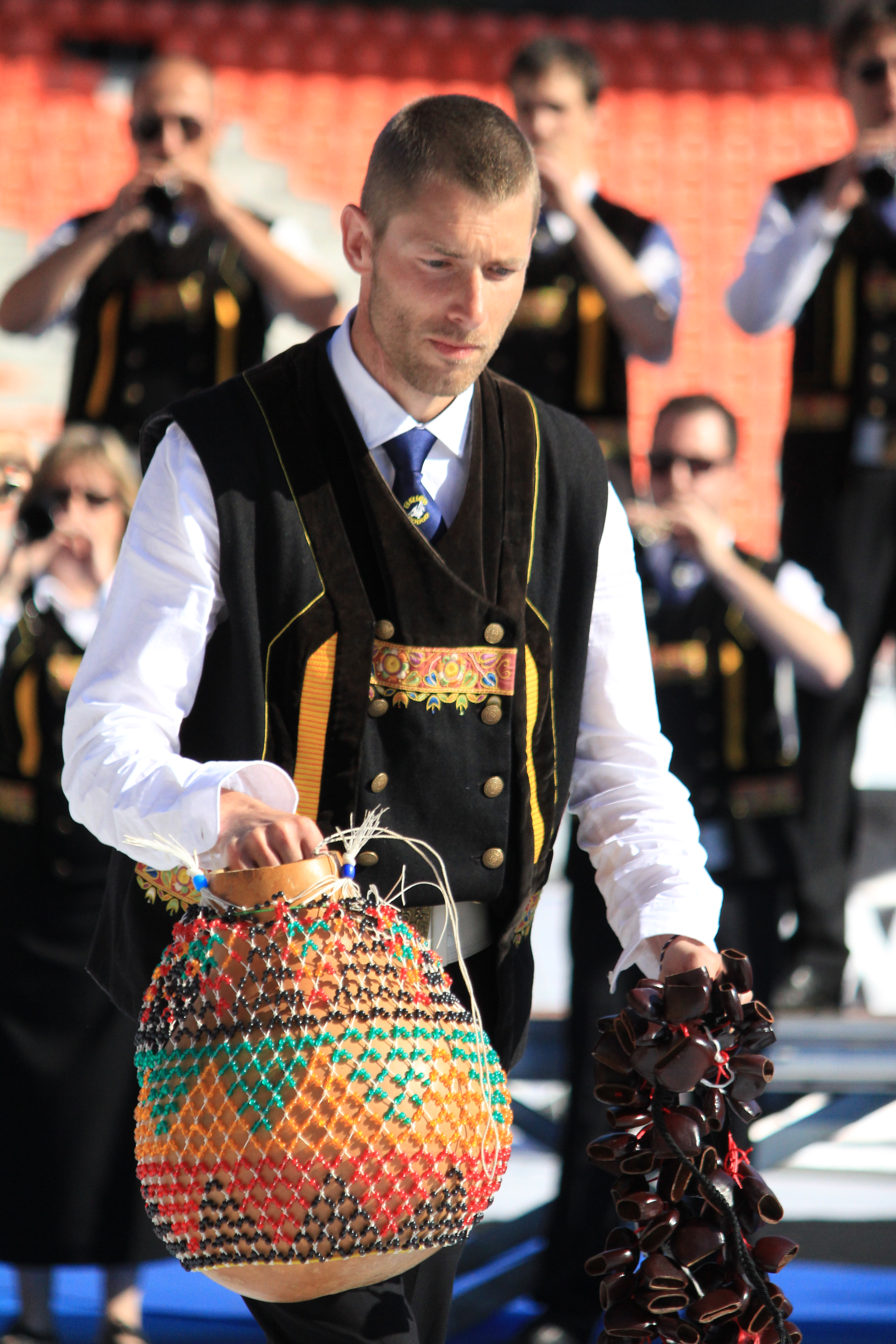 championnat national des bagadoù 2015, épreuve de Lorient au Moustoir. Groupe de 1ère catégorie